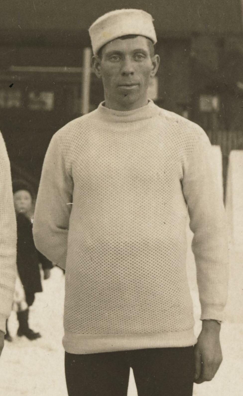 De norske representanter ved verdensmesterskabsløbene i Davos 1908